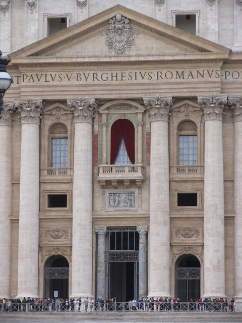 San Pietro, Roma, Italia